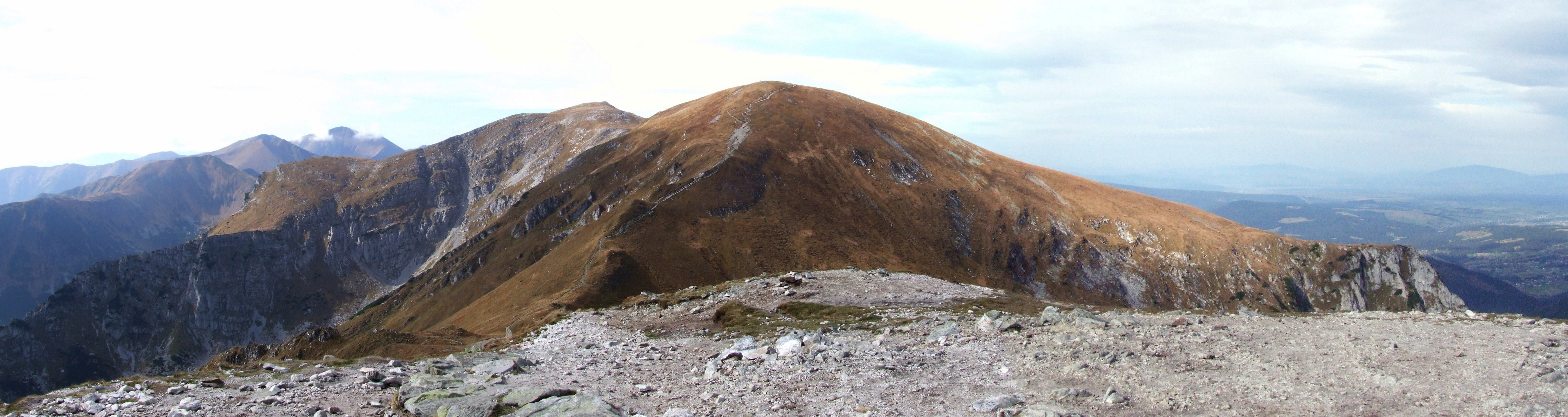 Widok z Kopy Kondrackiej: od prawej strony Małołączniak, Krzesanica, Ciemniak, po lewej stronie w głębi Tomanowy Wierch, Smreczyński Wierch, Kamienista, Bystra